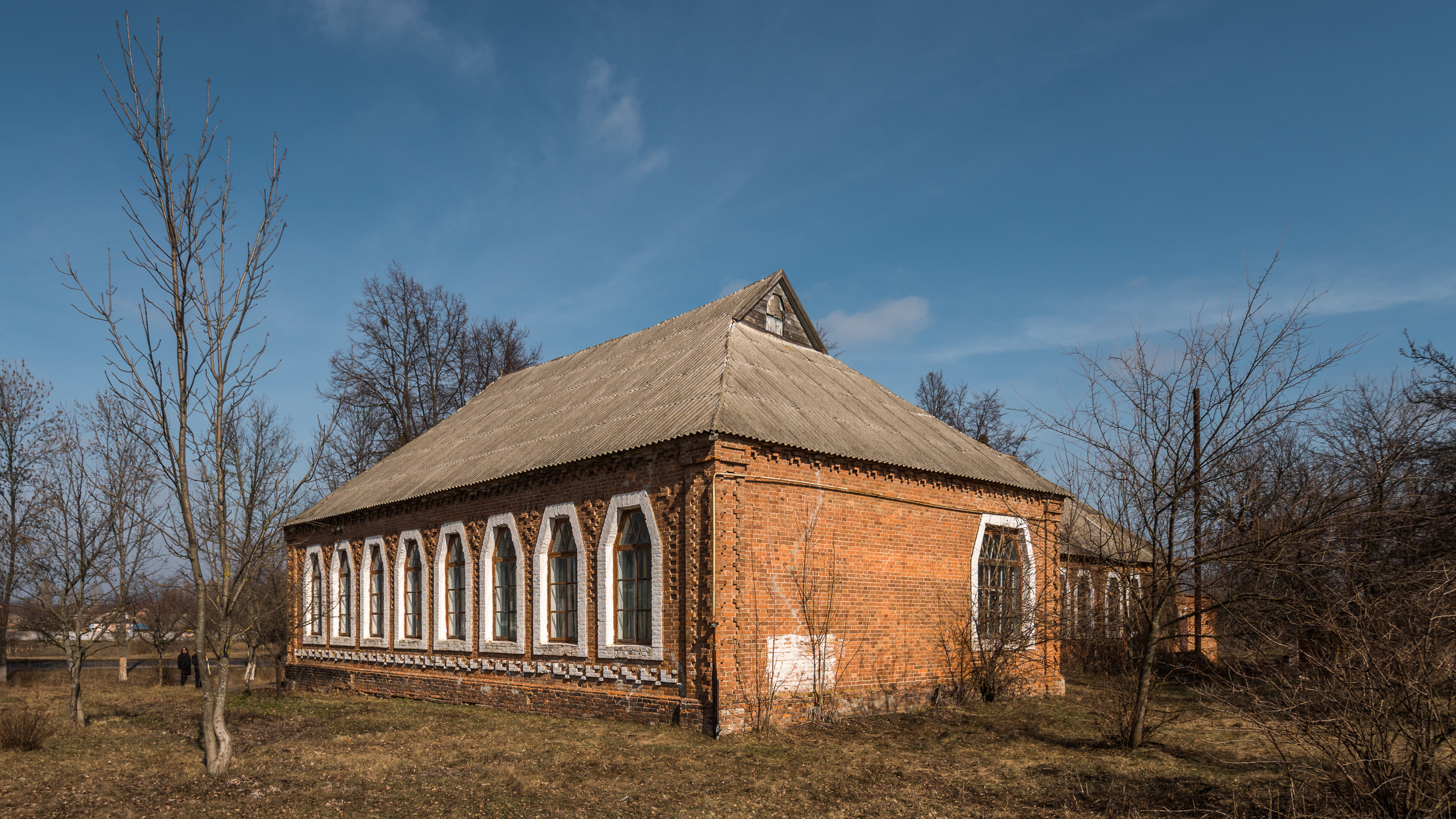 Будинок двокомплектной земської школи в районі Брисі міста Заводського, Лохвицького району Полтавської областіі. Архітектор О. Сластьон.